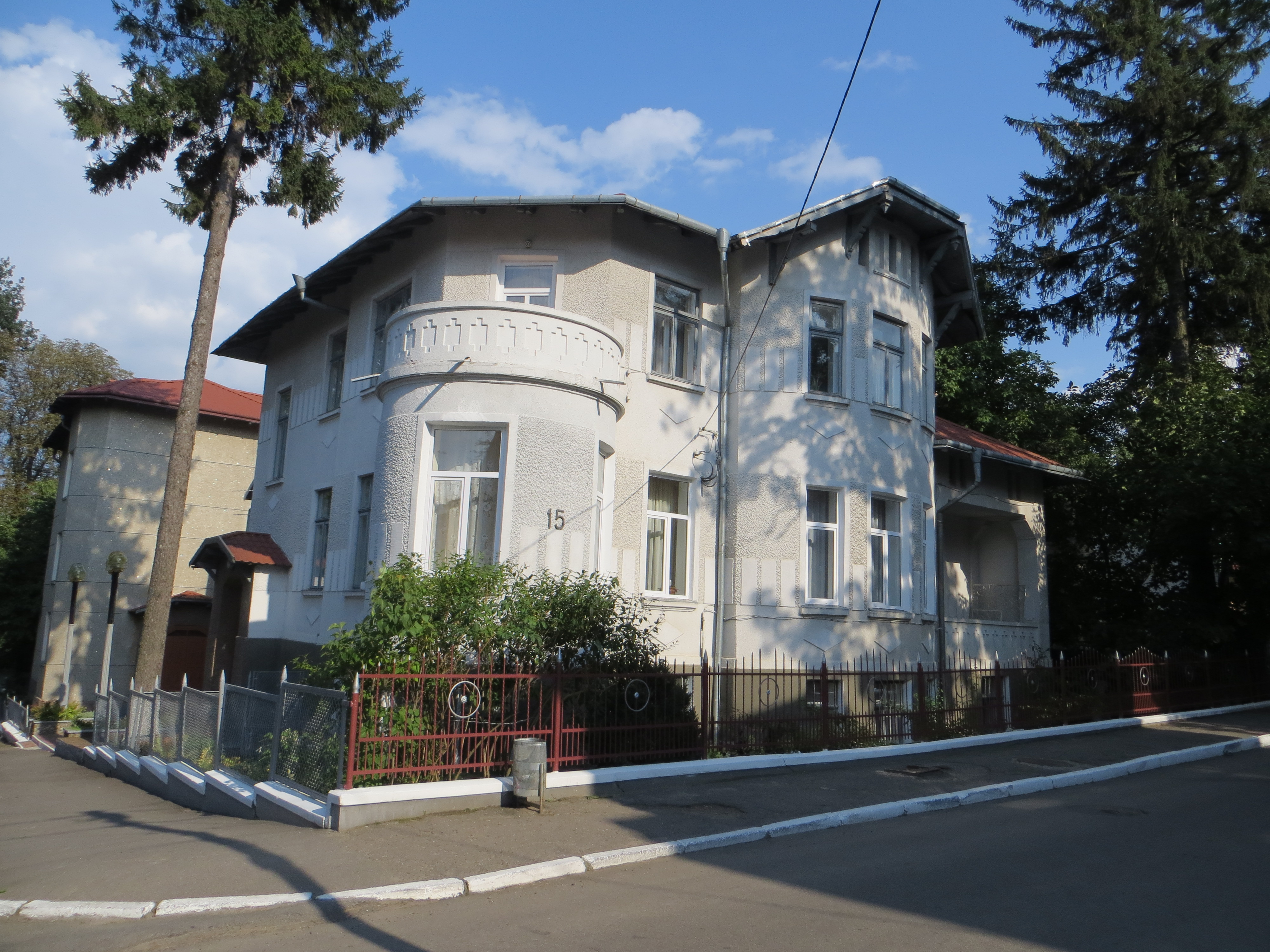 Житловий будинок, Чернівці, Федьковича Юрія, 15